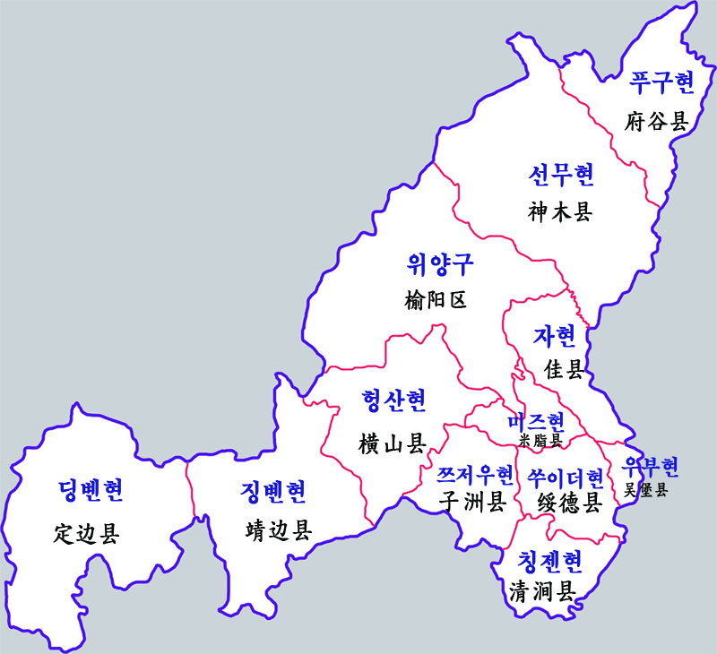 위린시 현급구역도